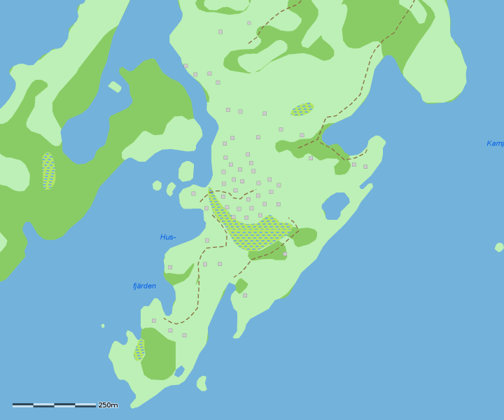 Karta över ön Harstena i Östergötlands skärgård